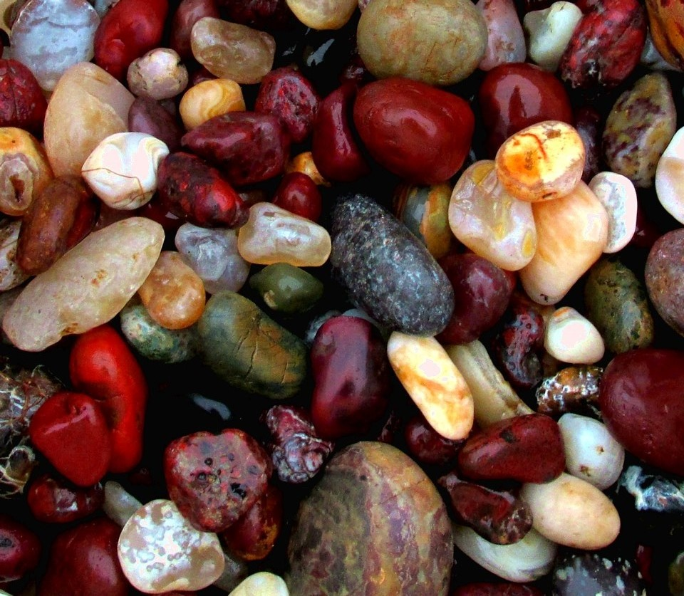 青森県,七里長浜,水摩礫,錦石